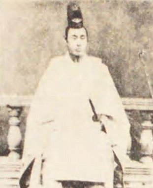 醍醐忠順（1830-1900）